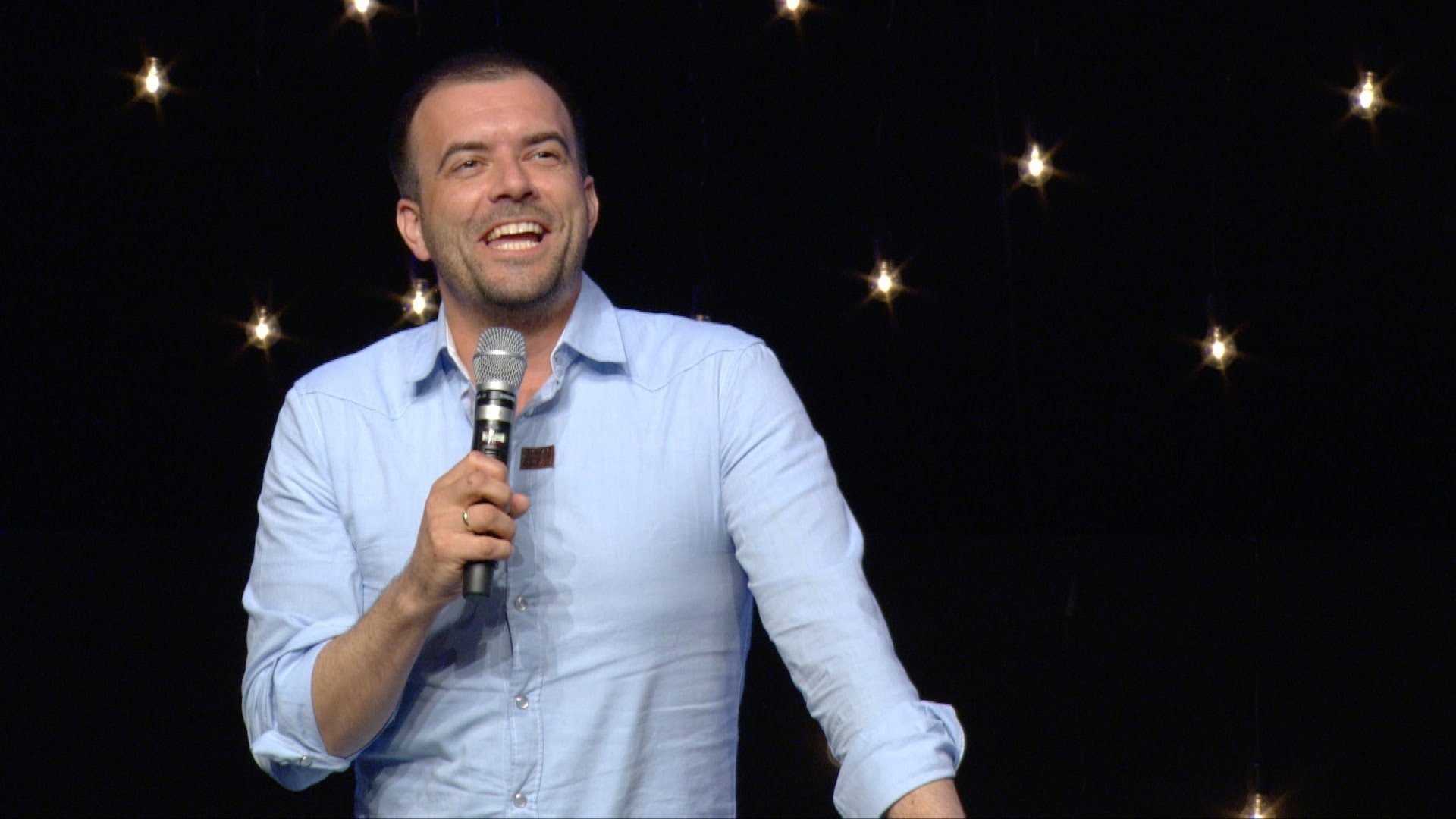 Øystein Gjerme under iFokus konferansen i Buen kulturhus, Mandal 2014